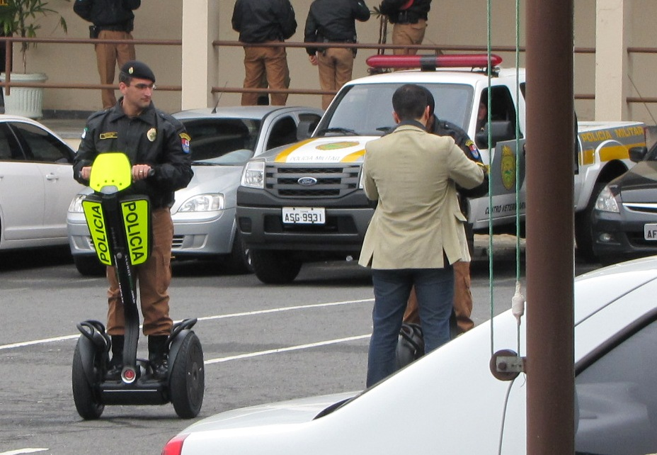 Policial militar da Paraná em treinamento com Segway.